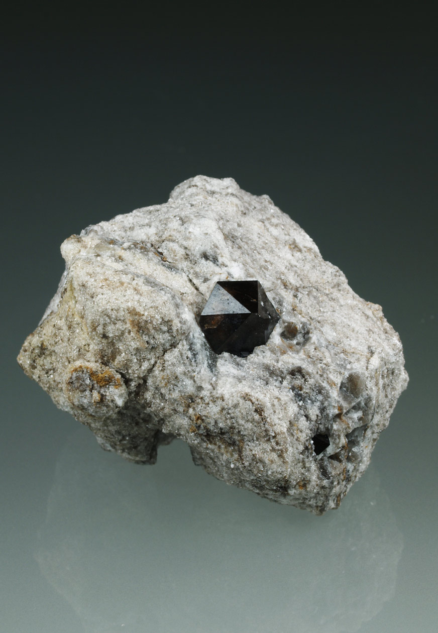 A medio camino entre Granada y Jaén, en el límite norte de la provincia granadina, se halla la población de Montejícar. Esta zona es conocida entre los coleccionistas de minerales por los excelentes cuarzos, entre ahumados a moriones, biterminados y con las caras de prisma muy poco desarrolladas, lo que les da un característico aspecto bipiramidal. Se encuentran estos ejemplares en yesos bandeados y margas del Trias en facies Keuper característico del entorno del Cortijo Cañadas, en el N del término municipal de Montejícar. En la zona hay diversos hornos de yeso, hoy en ruinas. Medidas: 4.5 x 3.5 x 3.2 cm. Cristal principal: 10 x 10 mm.